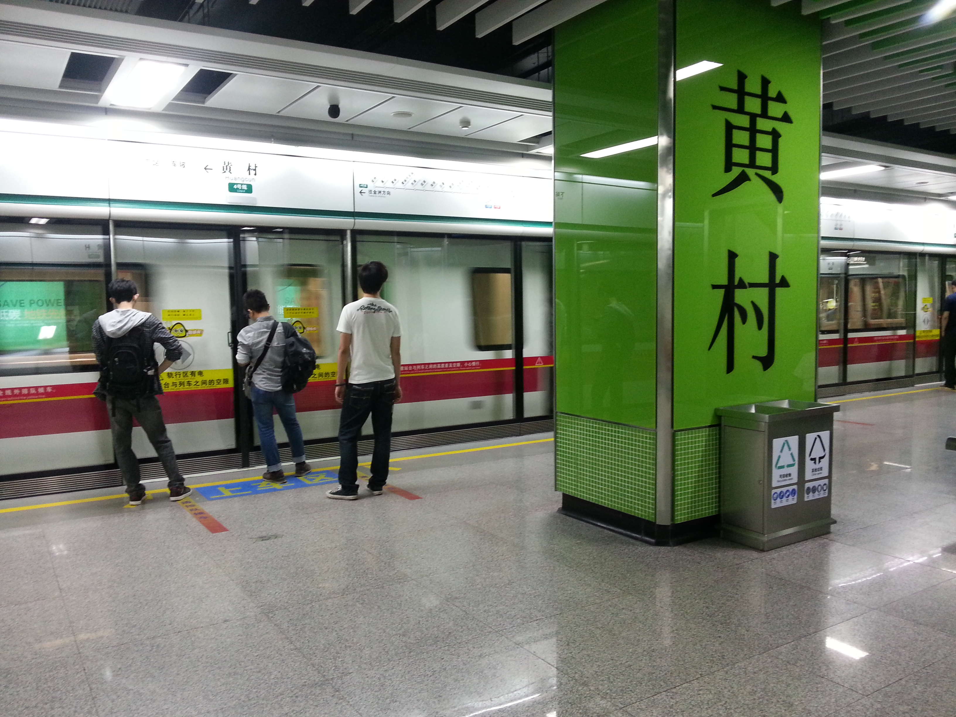 广州地铁4号线黄村站